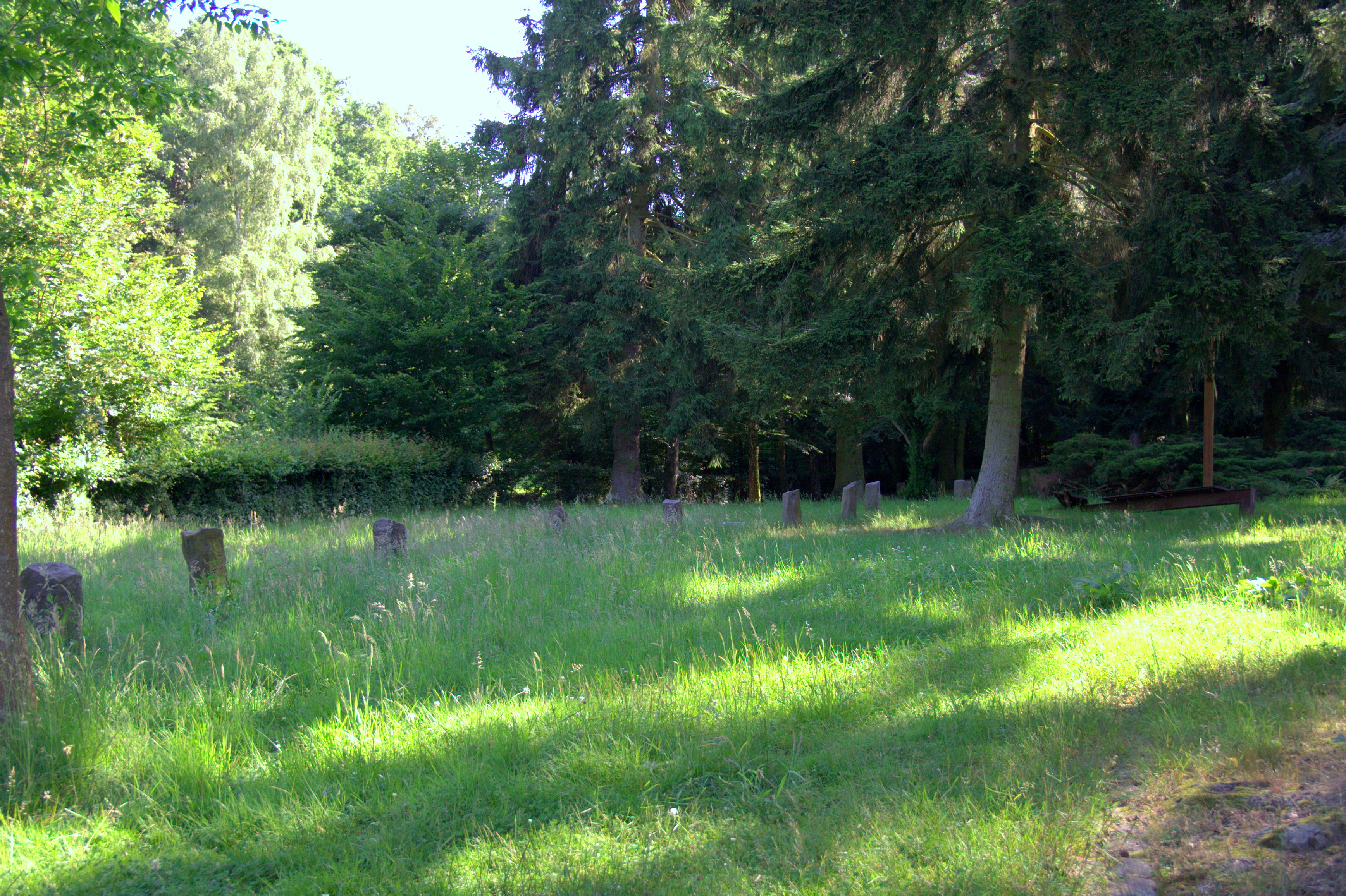 Blick auf den Gedenkort Waldfriedhof Trutzhain